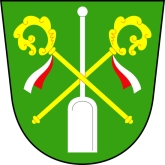 znak obce Rudimov